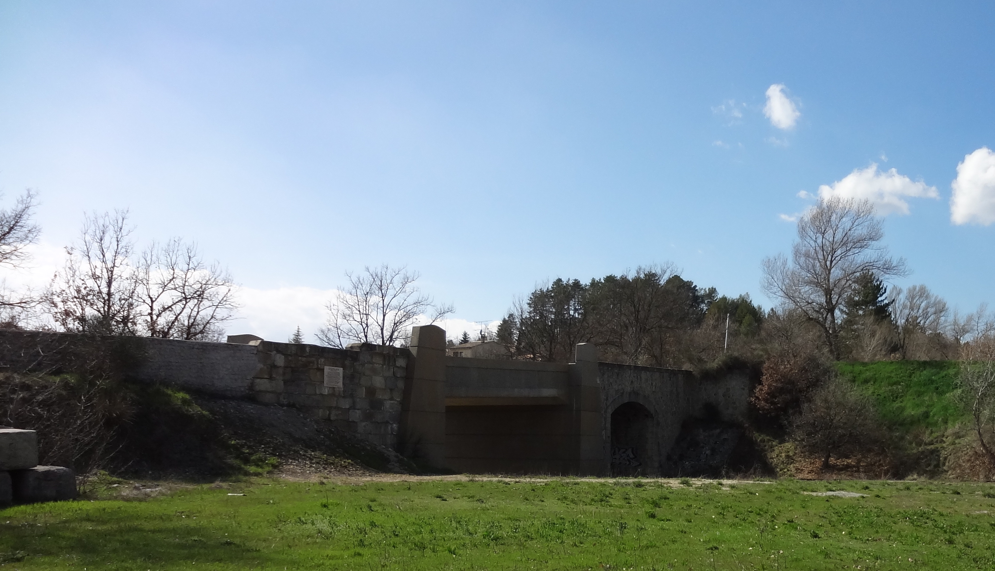 Vue est du pont-bâche de Mallemoisson, qui sert au passage d’un chemin agricole et d’un torrent. La RN 85 et la voie ferrée Château-Arnoux-Saint-Auban—Digne passent dessous. Le maquis de Thoard y stoppa la retraite de la garnison allemande de Digne en août 1944